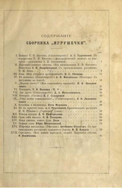 Оглавление Сборника "Игрушечки" 1890 год